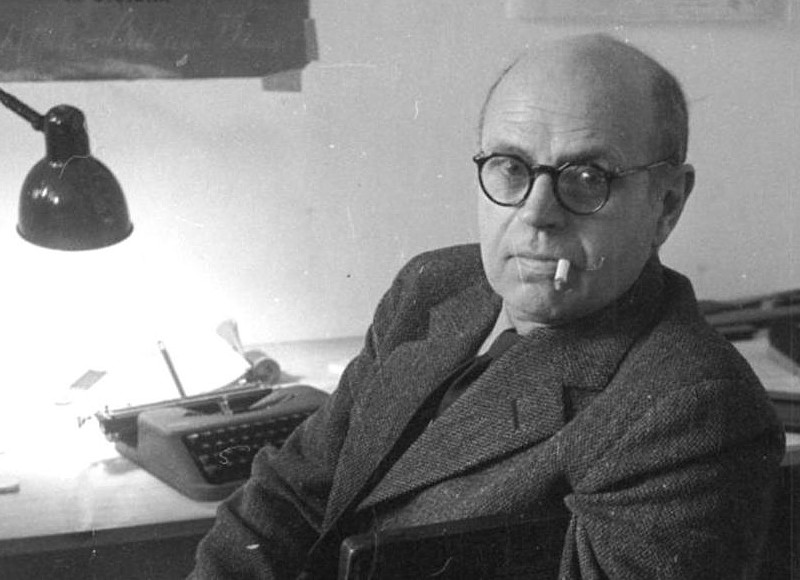 Poul Henningsen